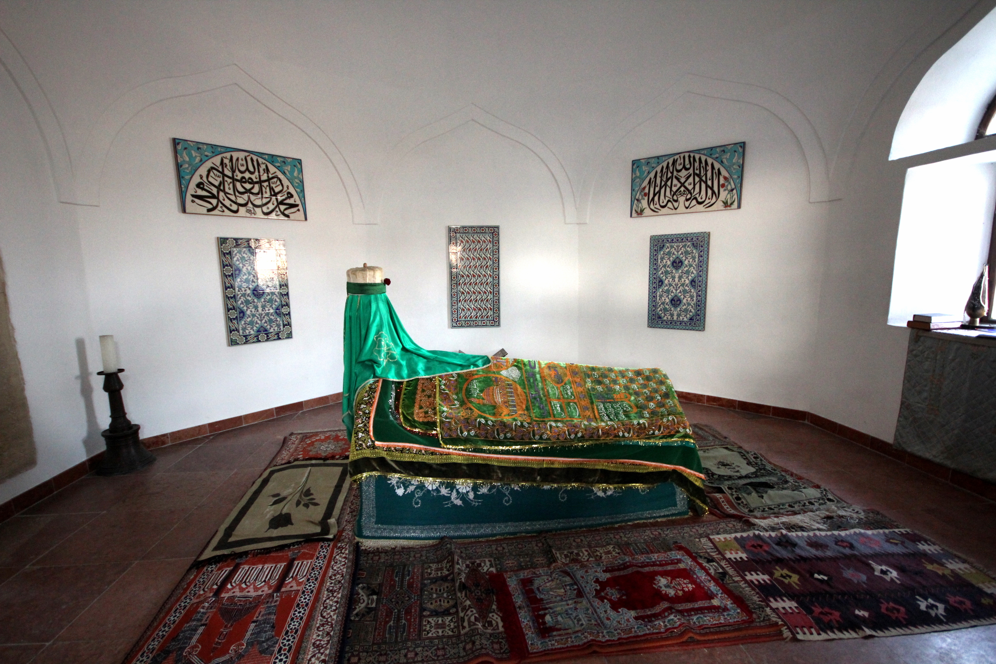 Gül Baba türbéjének belső tere, Budapest II. kerület This is a photo of a monument in Hungary. Identifier: 290